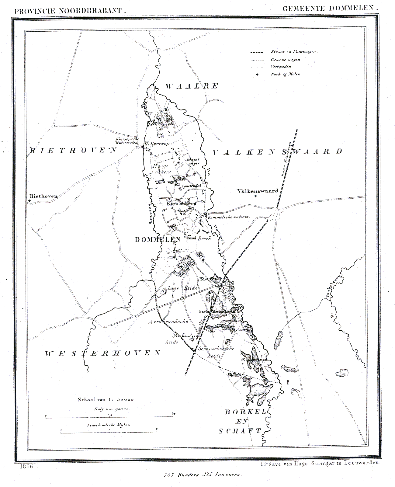 Nederland, Noord-Brabant, Gemeente Dommelen